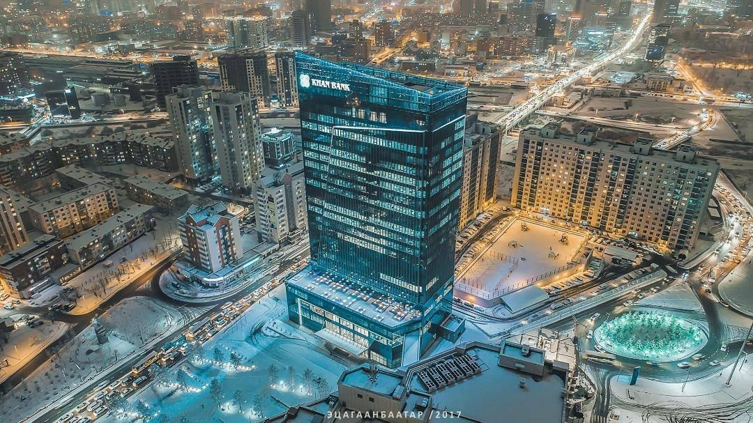 Монгол: ХААН Банкны төв оффис "ХААН Банк Цамхаг"